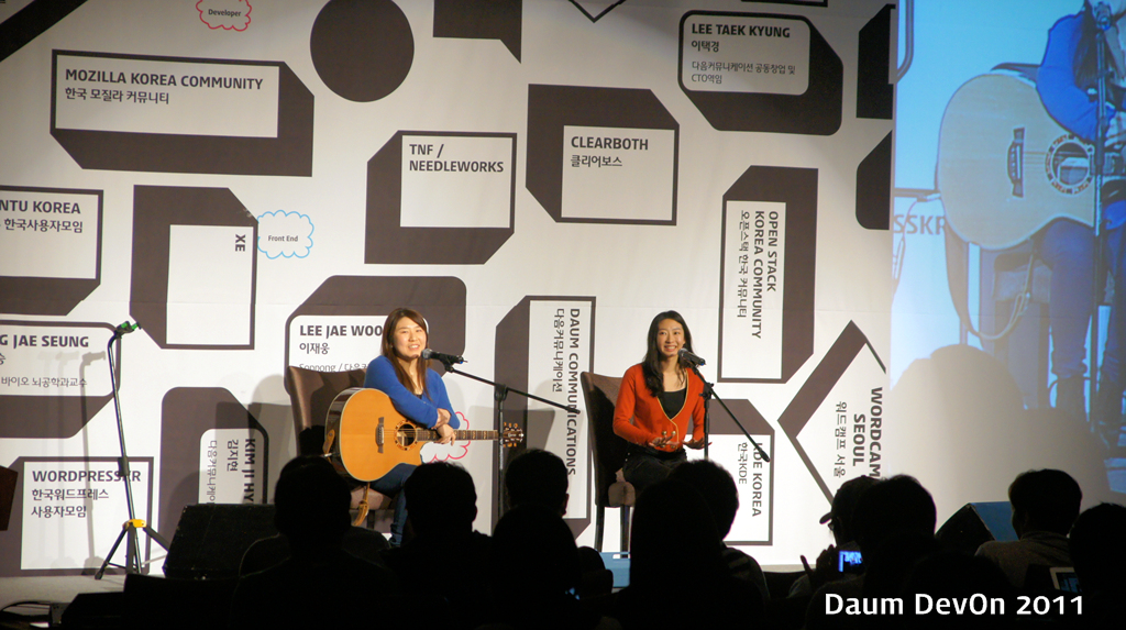 DevOn Daum 2011